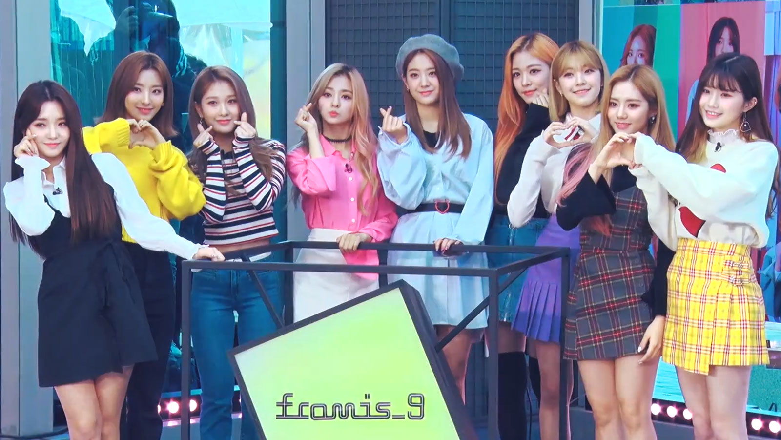 "미소에 반하다"···fromis_9, 과즙미 팡팡 터지는 매력 #프로미스나인 #fromis_9